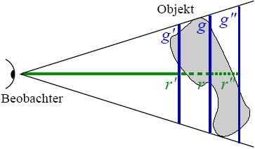 Scheinbare Größe bei unregelmäßigem Objekt. Das mit Beobachter markierte runde Etwas stellt ein Auge dar.